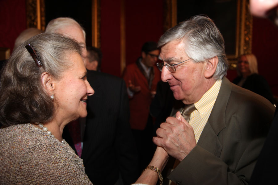 Sissy Strauss, Heinz Zednik-9883